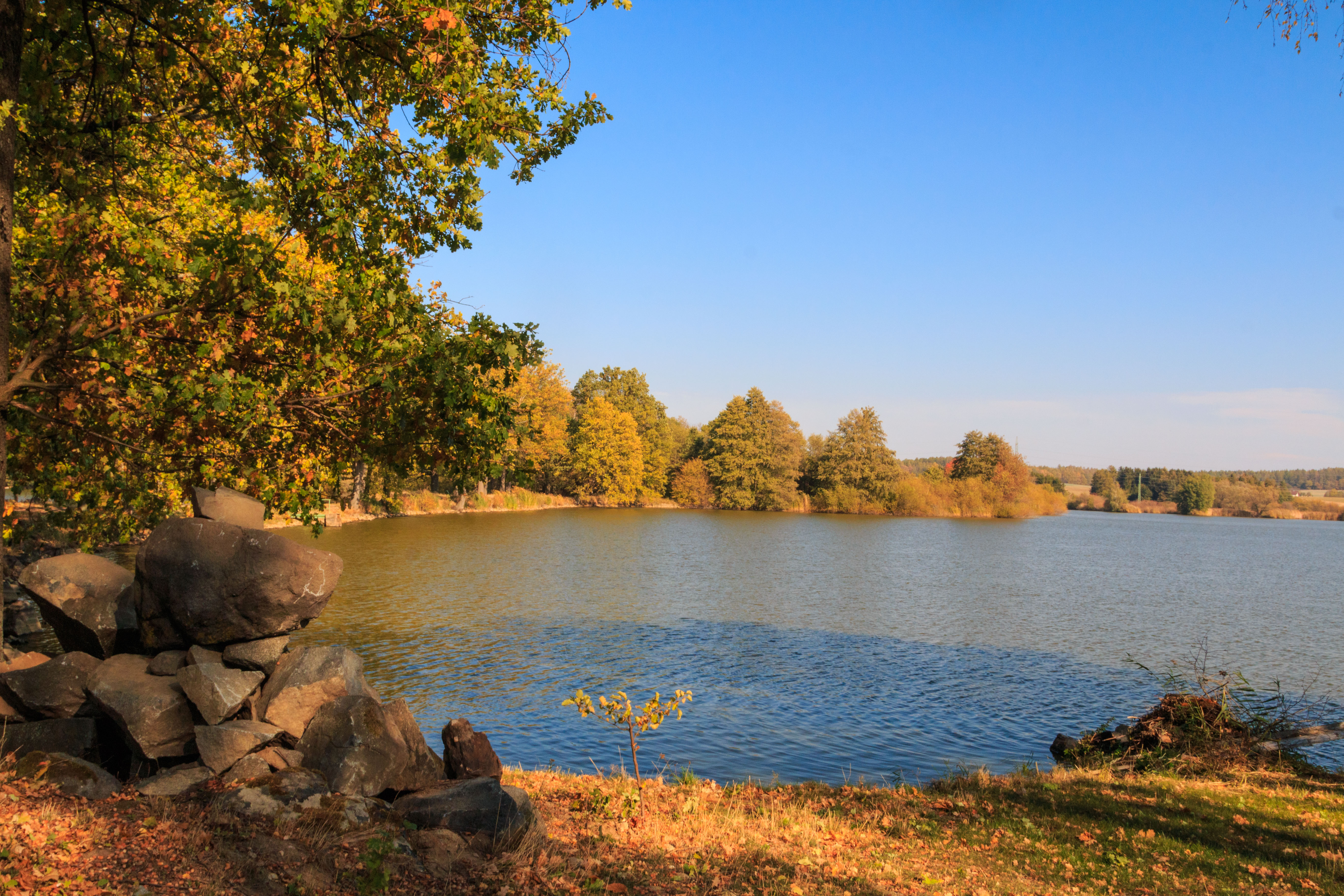 Rybník Hořička u Miřetic Project: Vodstvo. Ticket: 1617.